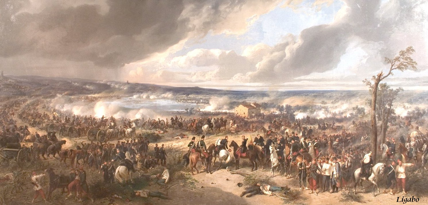 Battaglia di MedoleCollocazione: Campo di Medole, cascina Quagliara, 24 giugno 1859, ore 16,30 circa.Sinossi: Respinto l'ultimo massiccio attacco della 1ª armata austriaca del generale Wimpffen, il 4º corpo d'armata francese del generale Niel inizia la controffensiva verso Guidizzolo, sostenuto dalla divisione d'artiglieria del generale Soleille. Sulle colline, dopo aver espugnato Solferino (torre a sx) si nota in lontananza la prosecuzione dello scontro tra la linea francese e quella austriaca per il controllo di Monte Fontana, nei pressi di Cavriana (torre a dx). Le ostilità verranno momentaneamente interrotte dal forte nubifragio in arrivo.